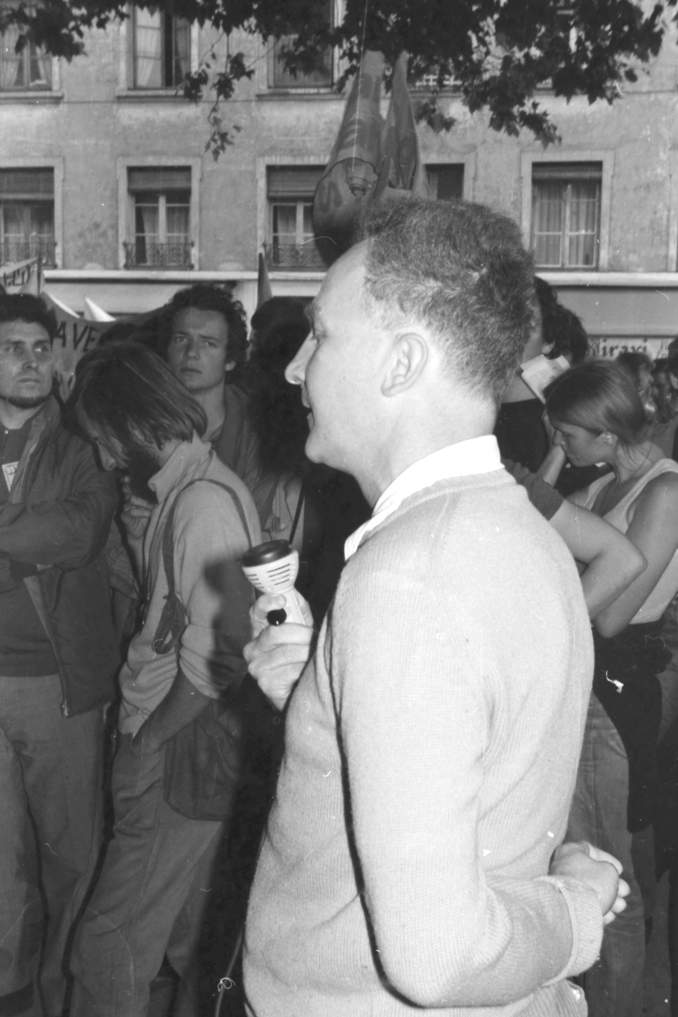 Maître Jean-Jacques de Felice prend la parole au cours de la marche du Groupe d'action et de résistance à la militarisation, contre la force de frappe nucléaire, de Lyon au Mont Verdun, le 19 juin 1971.